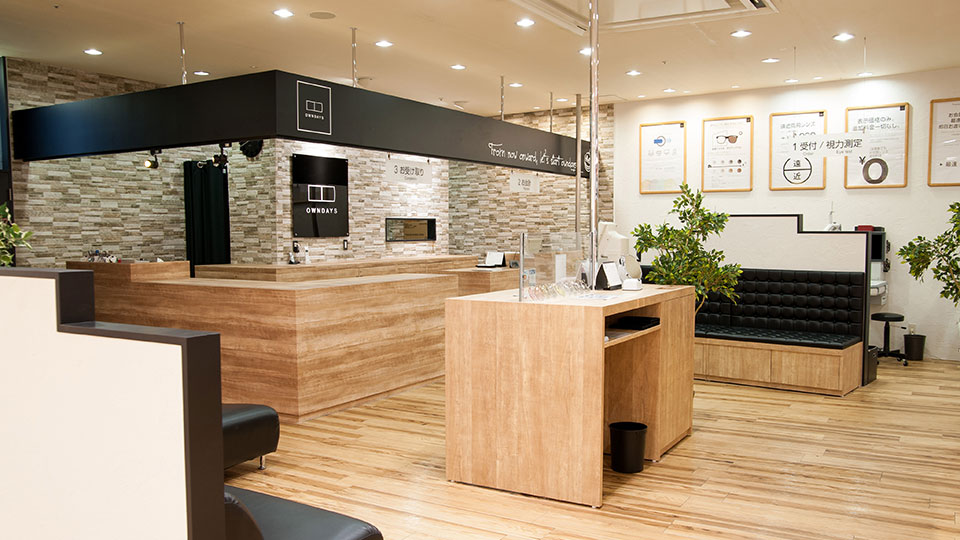 OWNDAYS SHOP